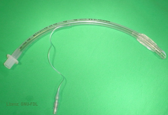 Endotrachealtubus - Sonde endotrachéale